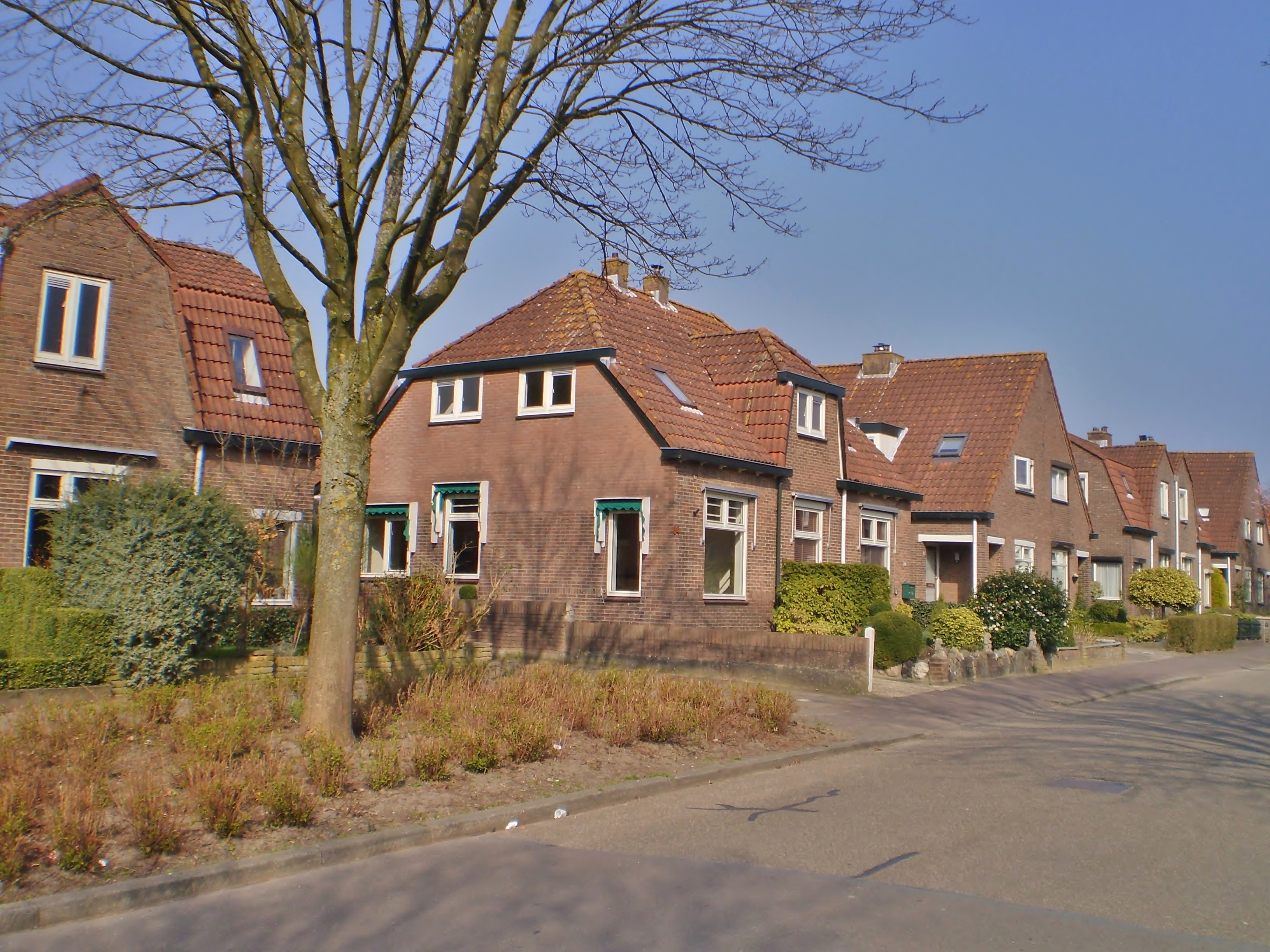 Molenstraat